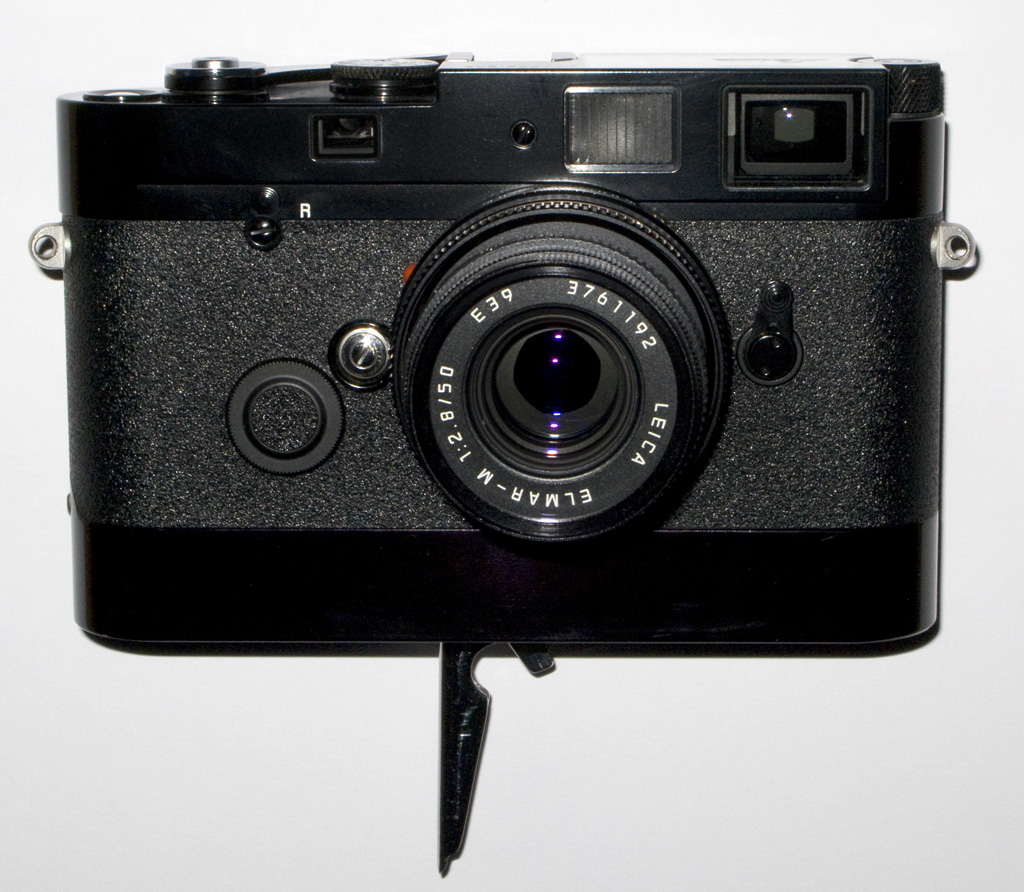 Leica MP mit RapidWinder und Elmar 2.8/50mm